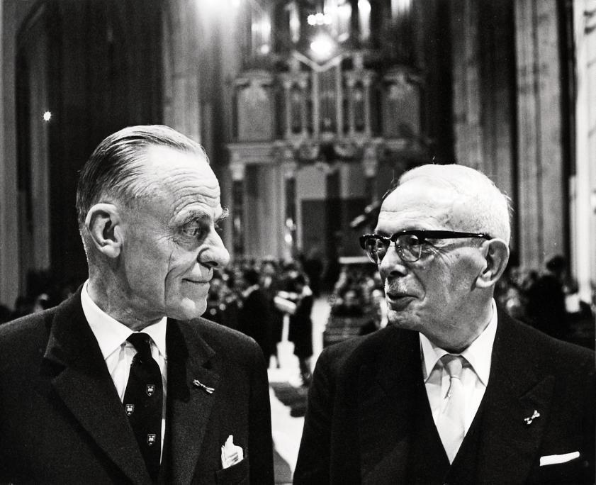 De heer A.B. Roosjen (rechts), voorzitter van de NCRV, samen met W.A. Visser 't Hooft tijdens een bijeenkomst tgv het 40-jarig bestaan van deze omroep in de Eusebiuskerk in Arnhem. Nederland, 9 november 1964.